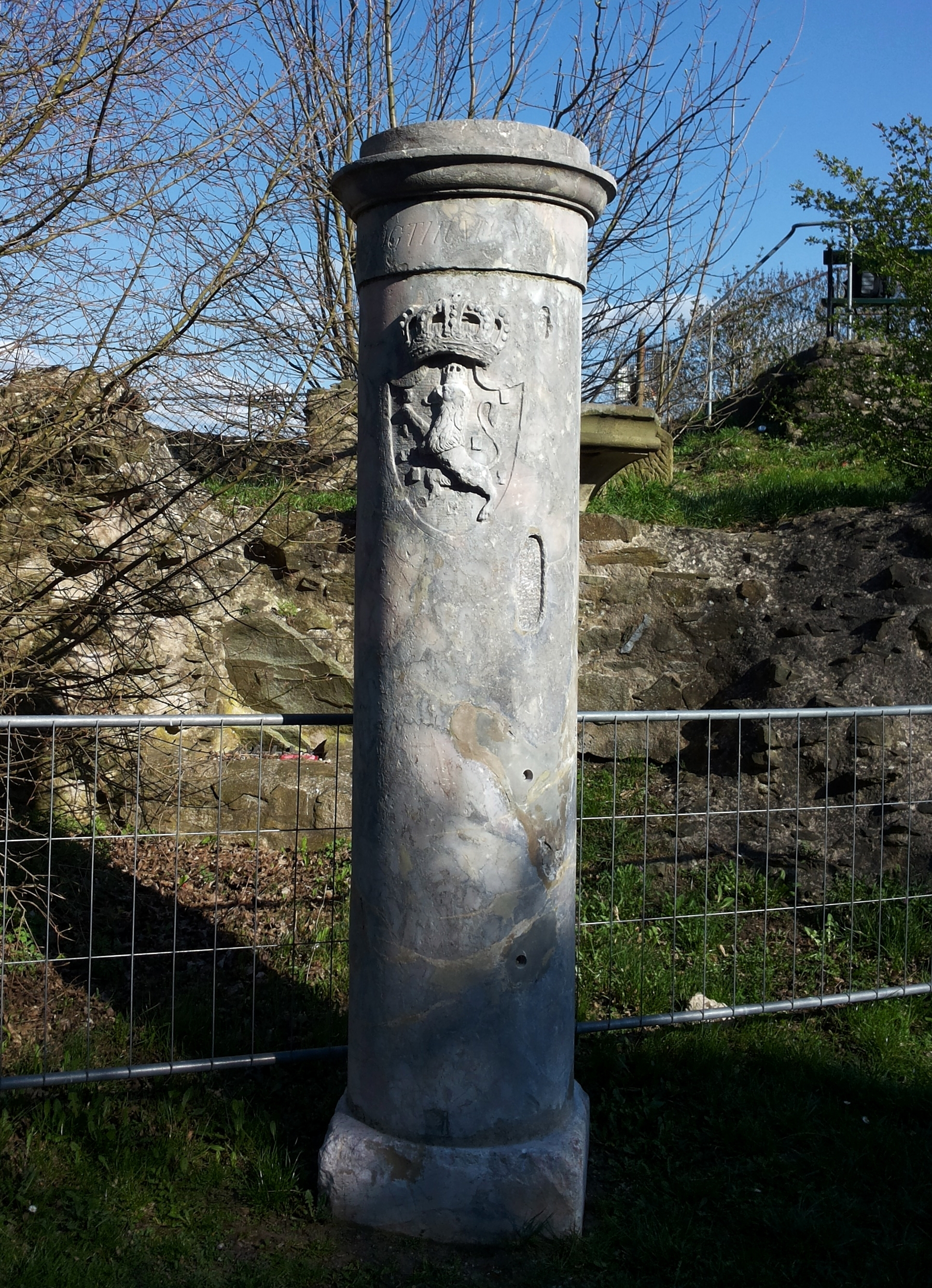 Dillenburg, denkmalgeschützte translozierte Grenzsäule des Herzogtums Nassau (neben dem Wilhelmsturm)